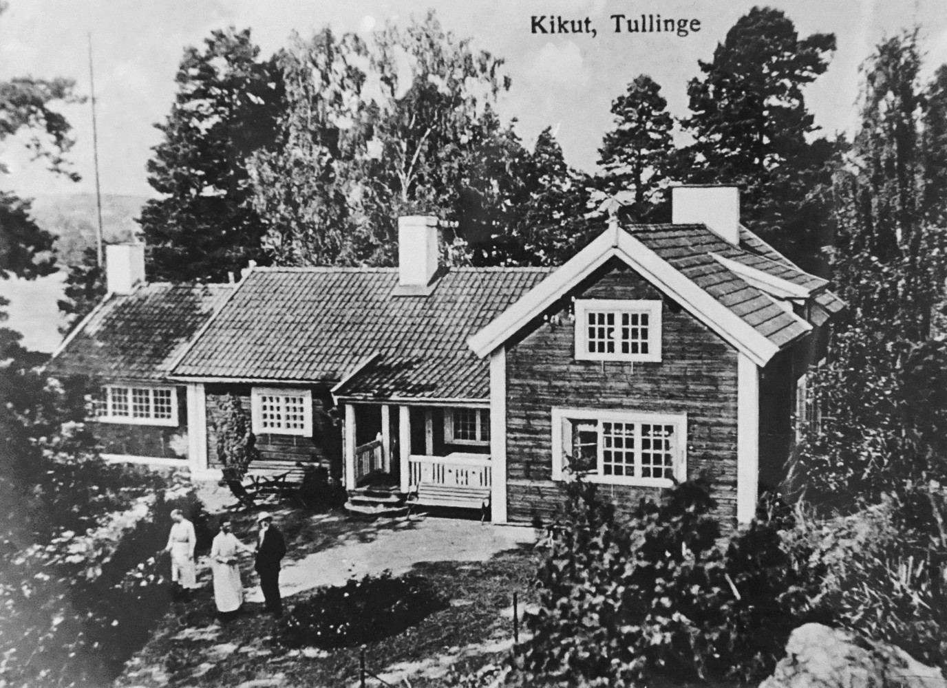 Villa Kikut, Alice Tegnérs hus mellan 1912 och 1926